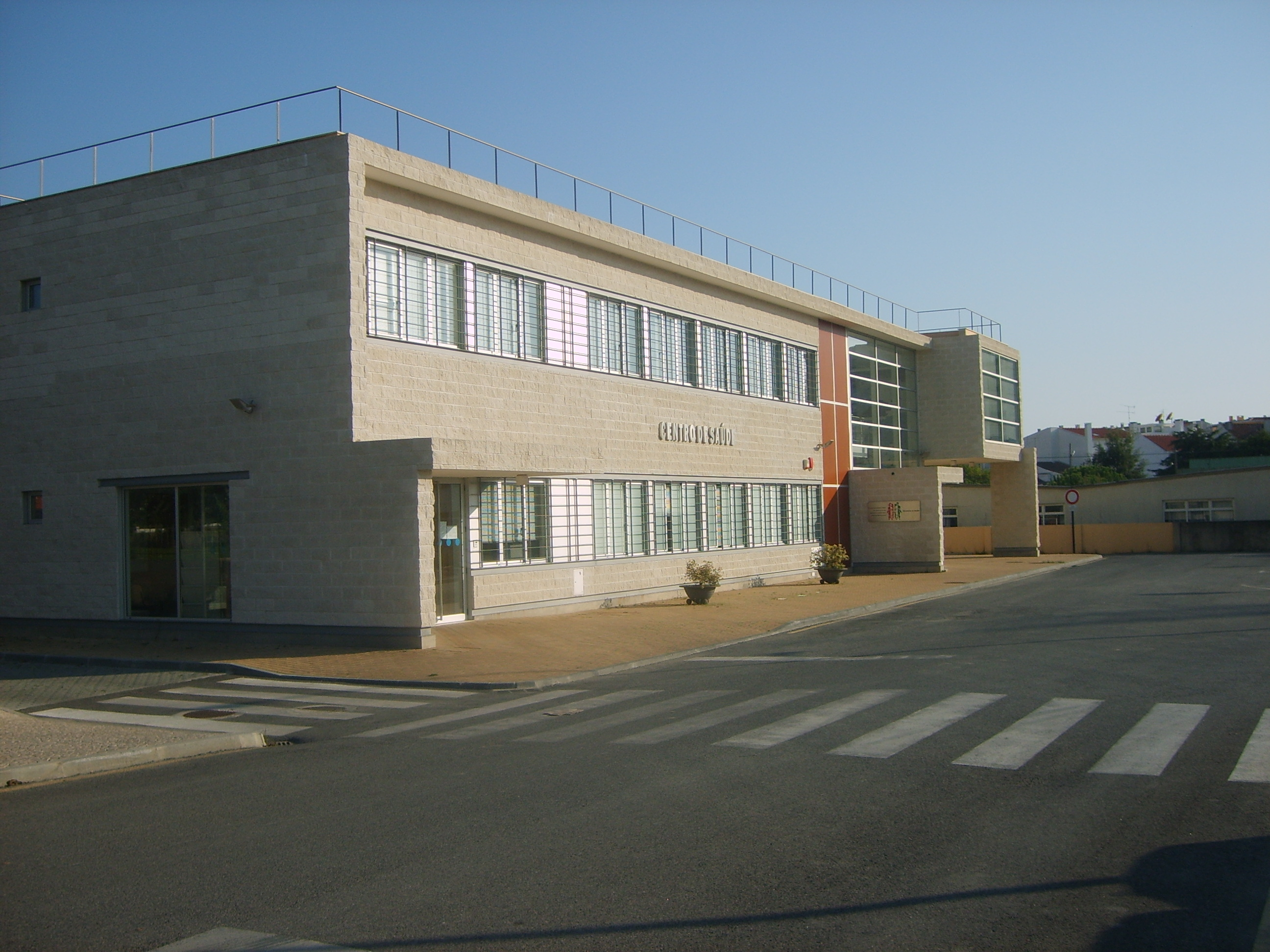 Lourinhã